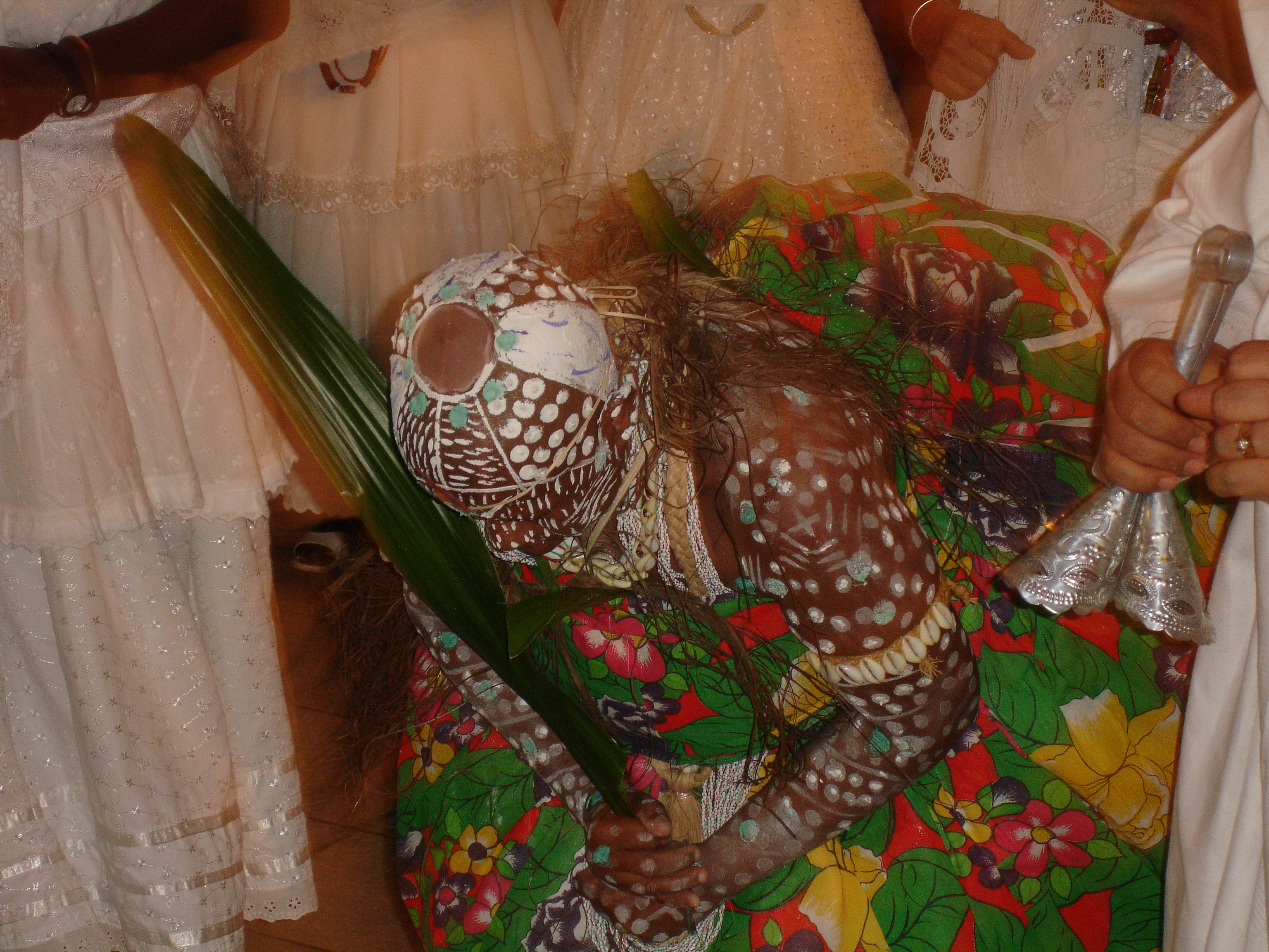 Iyawo segunda saida, pintura colorida. Orossi, Salvador Bahia.